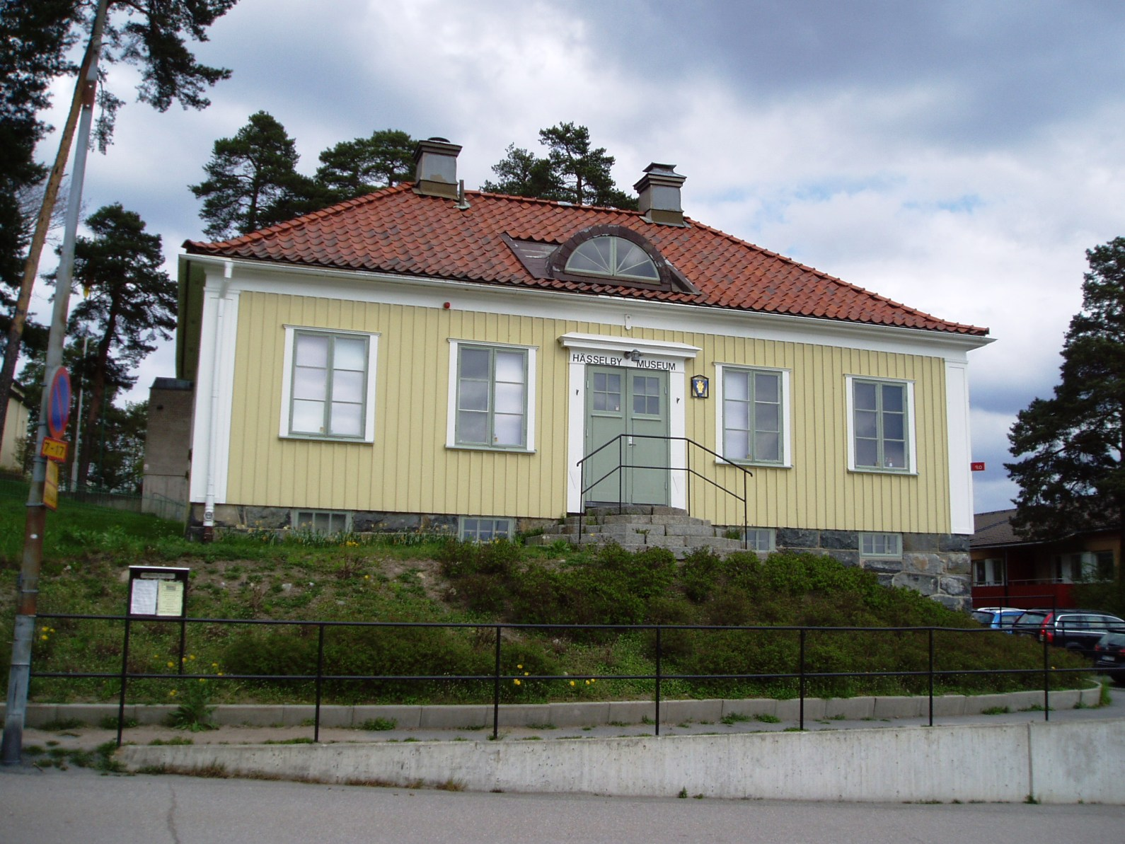 Hässelby museum, Hässelby-Villastad, Sweden